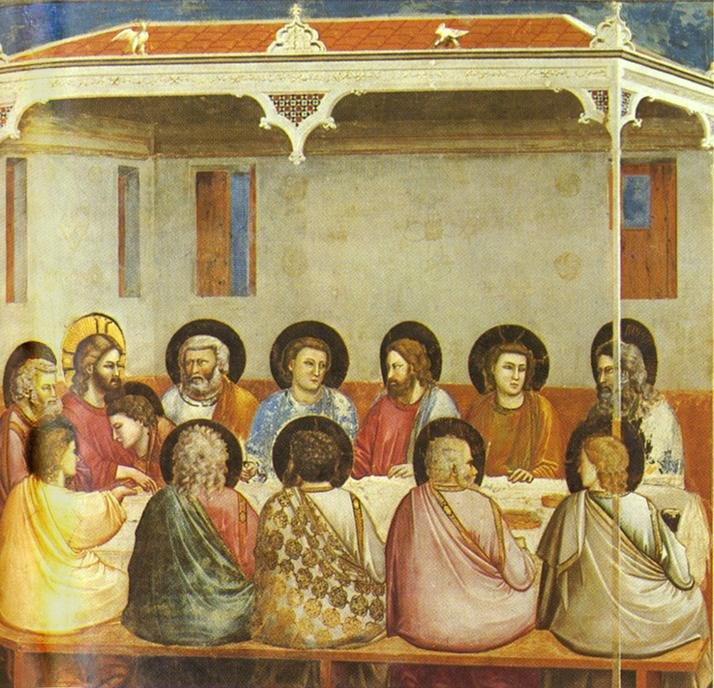 Giotto di Bondone (1267-1337), Cappella Scrovegni a Padova, Life of Christ, Last Supper